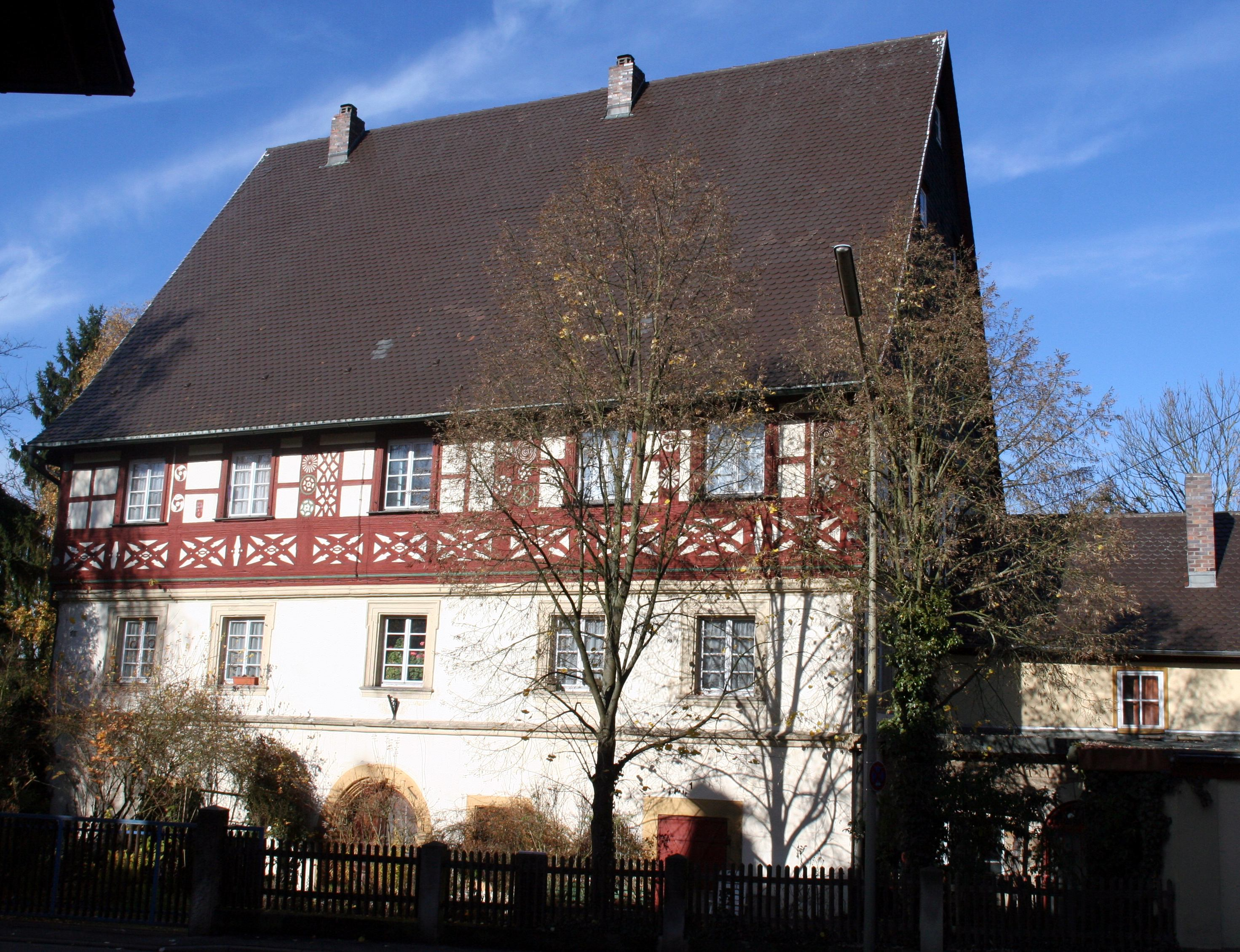 Haus Schemenau in Küps in Oberfranken